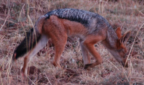 Gemaakt door Arjen Mulder, Krugerpark, Zuid-Afrika.